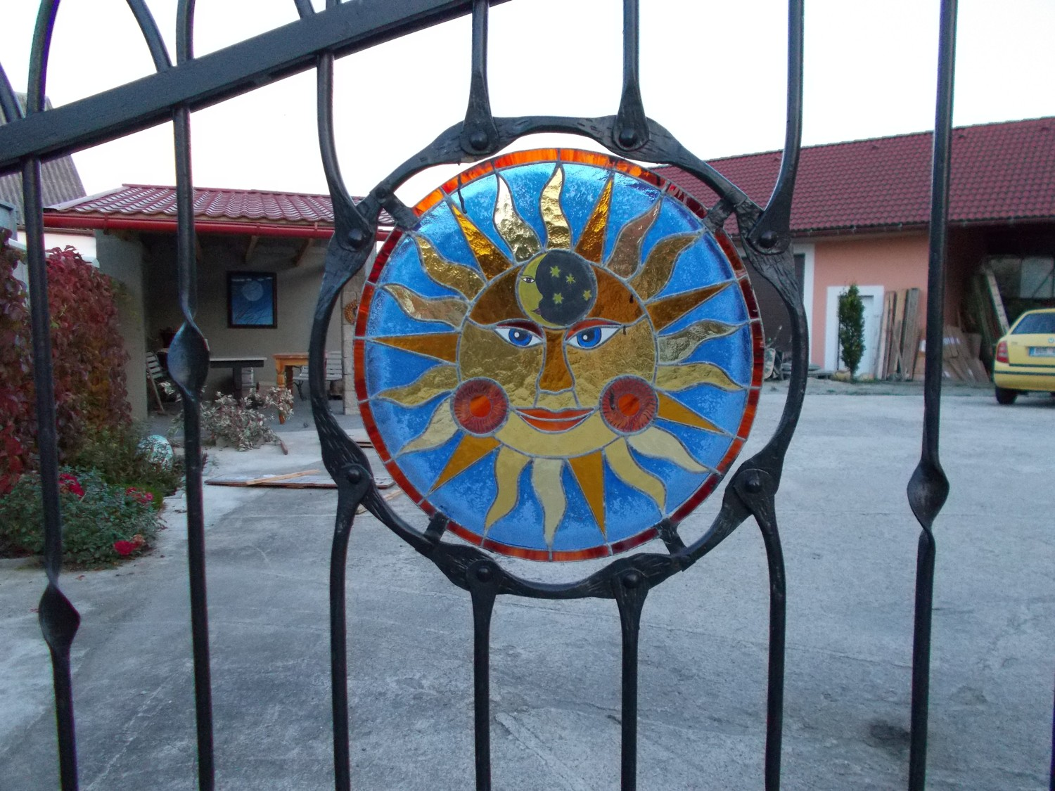 Vitrážová dílna Skloart v Lubenci. Okres Louny, Česká republika.